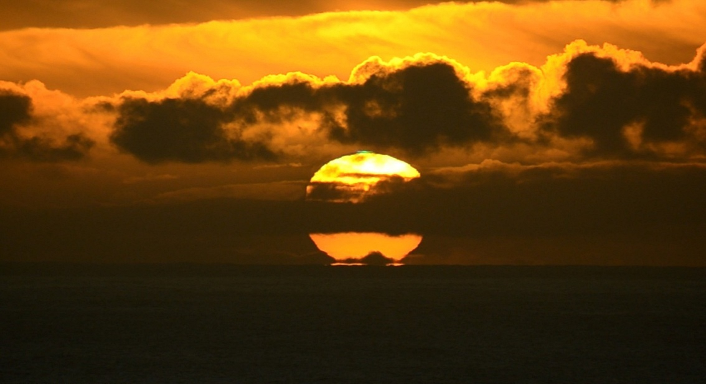 Amanecer desde Mar del Plata, Argentina. La salida del Sol es desde el océano Atlántico, por Esteban Josué Andrada, Aficionado a la Astronmía.